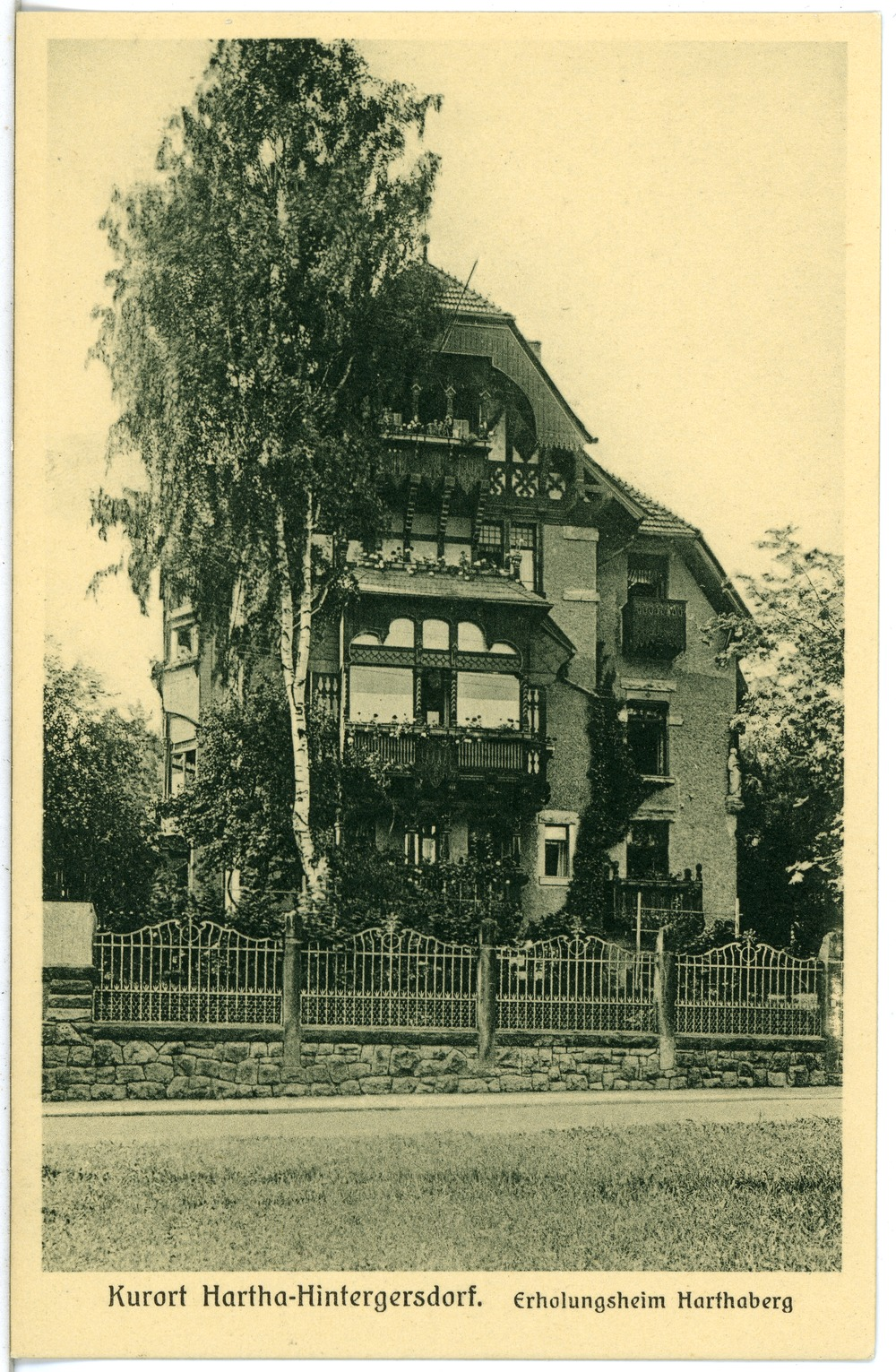 Hartha; Erholungsheim Harthaberg This postcard is from publisher Brück & Sohn in Meißen ( postcard has a unique number 24149 and is available in a higher resolution at the publisher. This images was uploaded in a cooperation project between Wikipedians and the publisher.